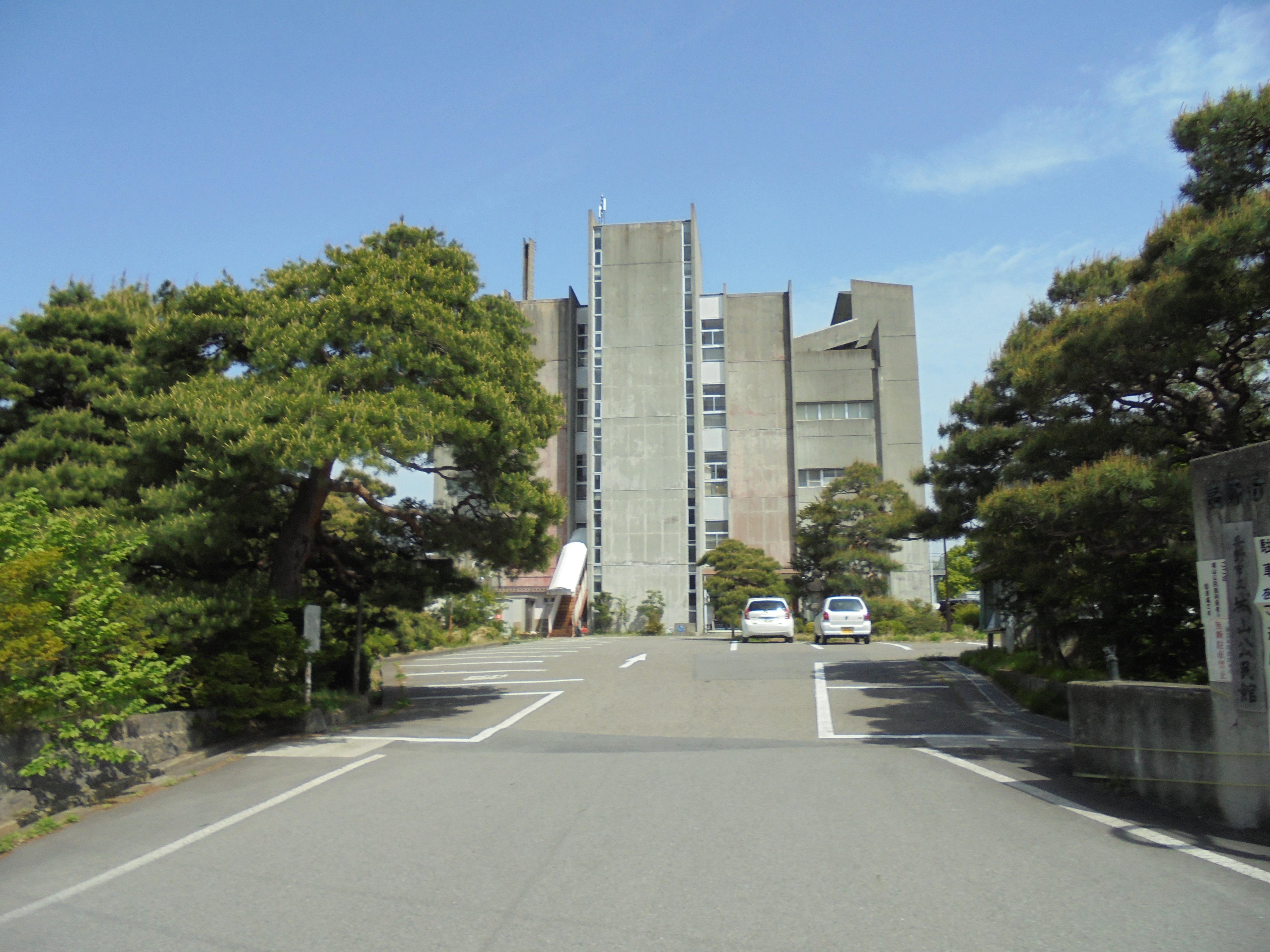 蔵春閣（長野県長野市東之門町）